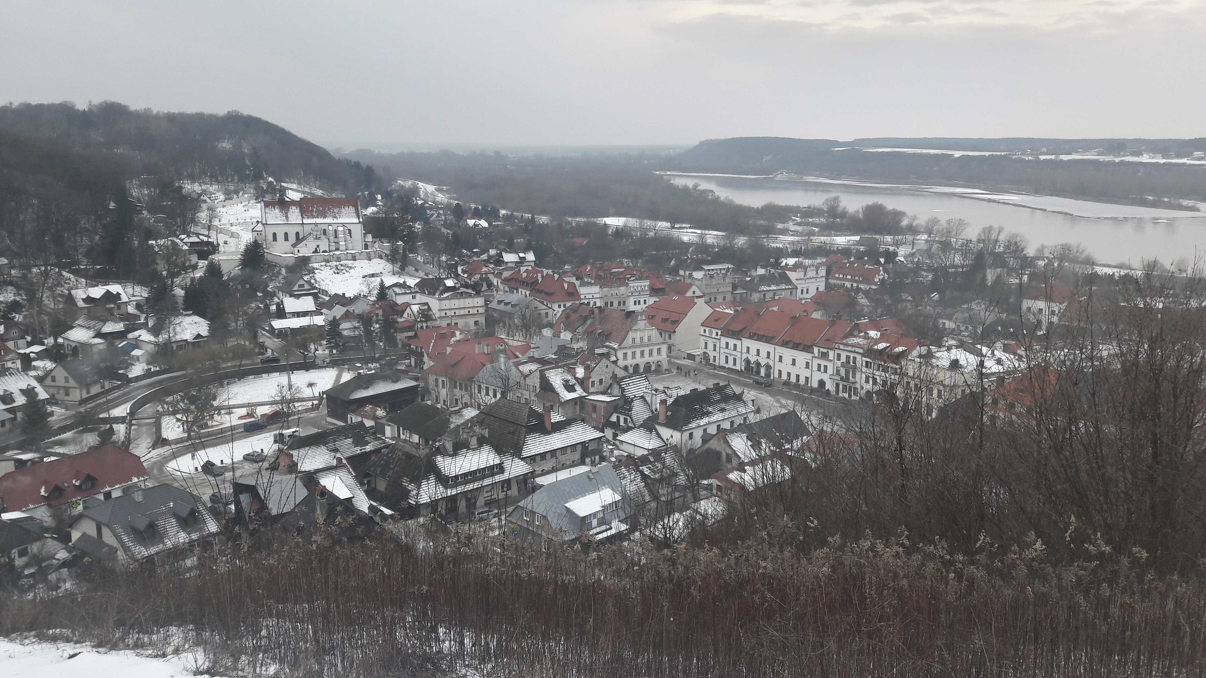 Zimowa panorama Kazimierza Dolnego z Góry Trzech Krzyży.